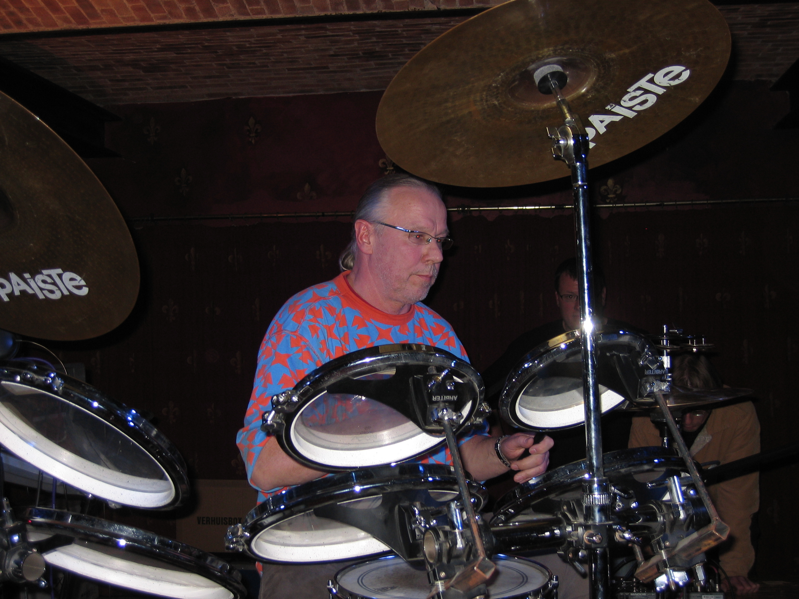 Der Musiker Harald Grosskopf während eines Auftritts in der Eifel, April 2008